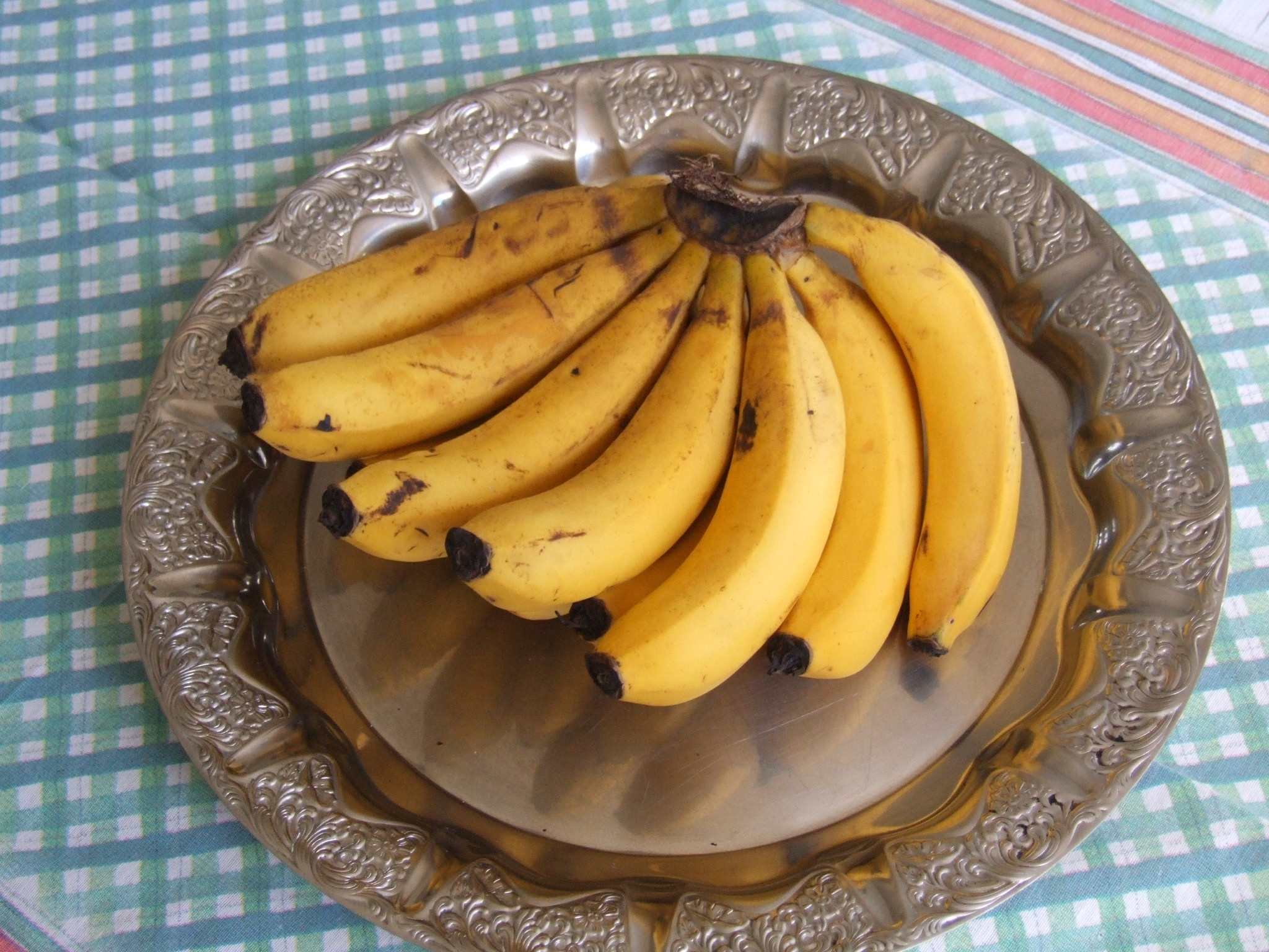 Um cacho de banana caturra